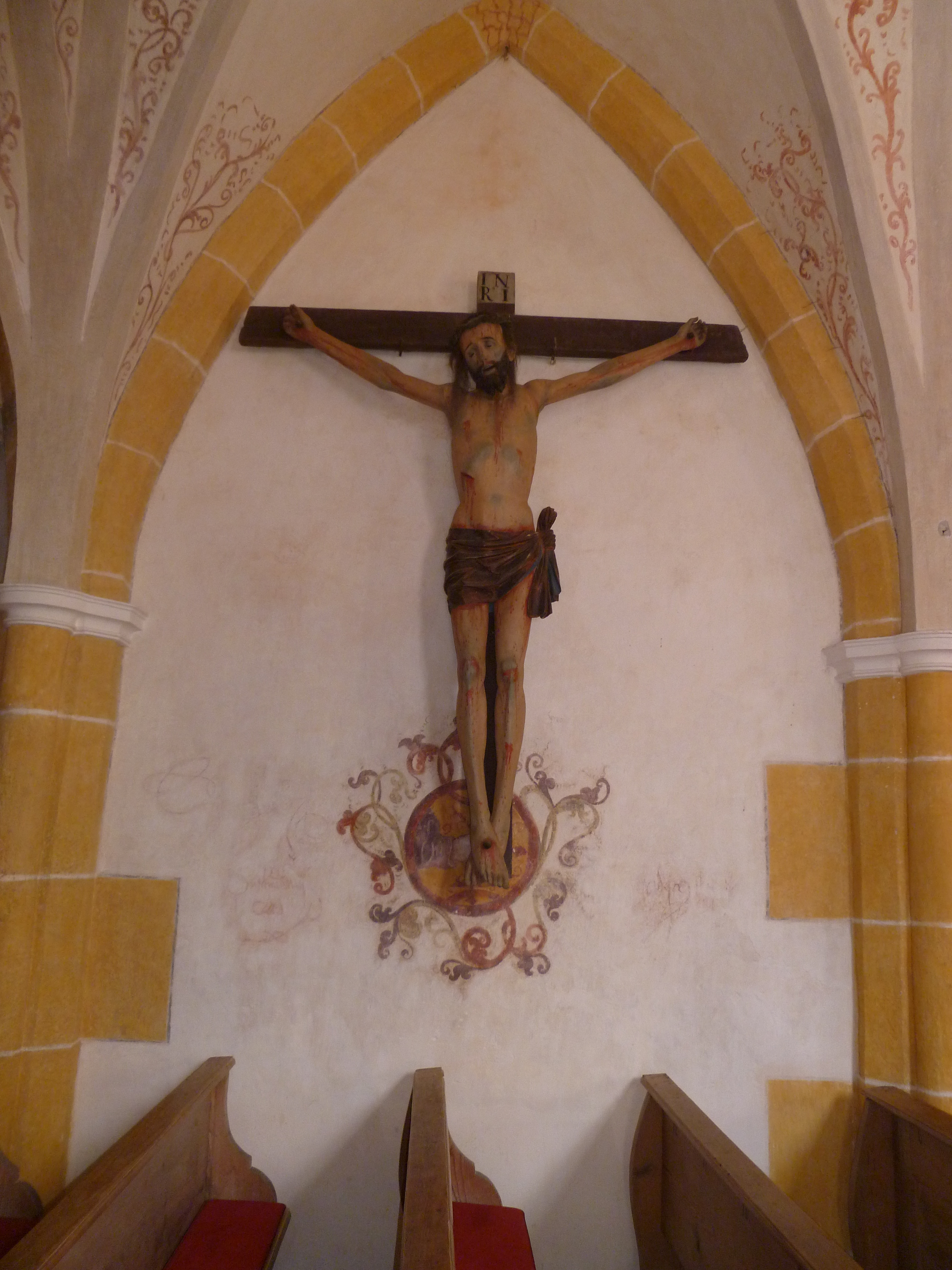 Kath. Filialkirche hl. Kreuz